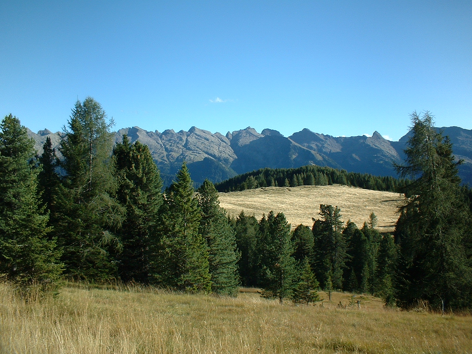 Sono l'autore della foto. Autore: Logudro. Data: 31/08/03.